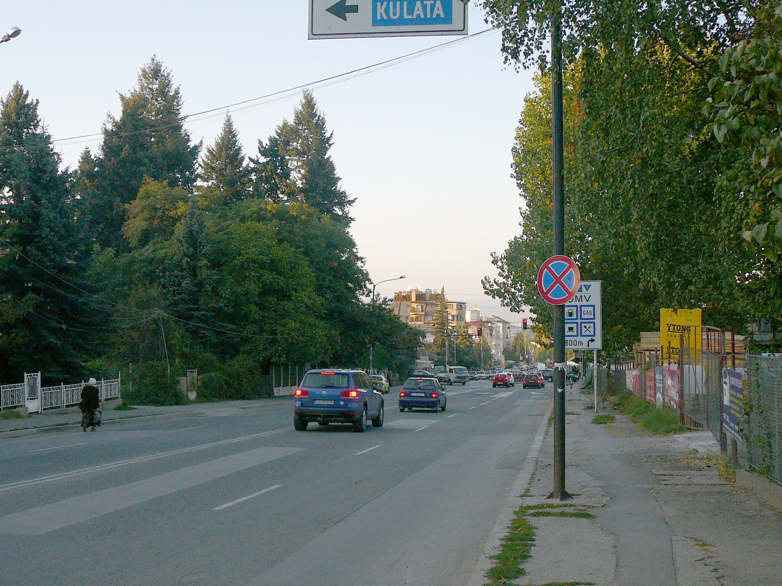 Template:Картинка инфо